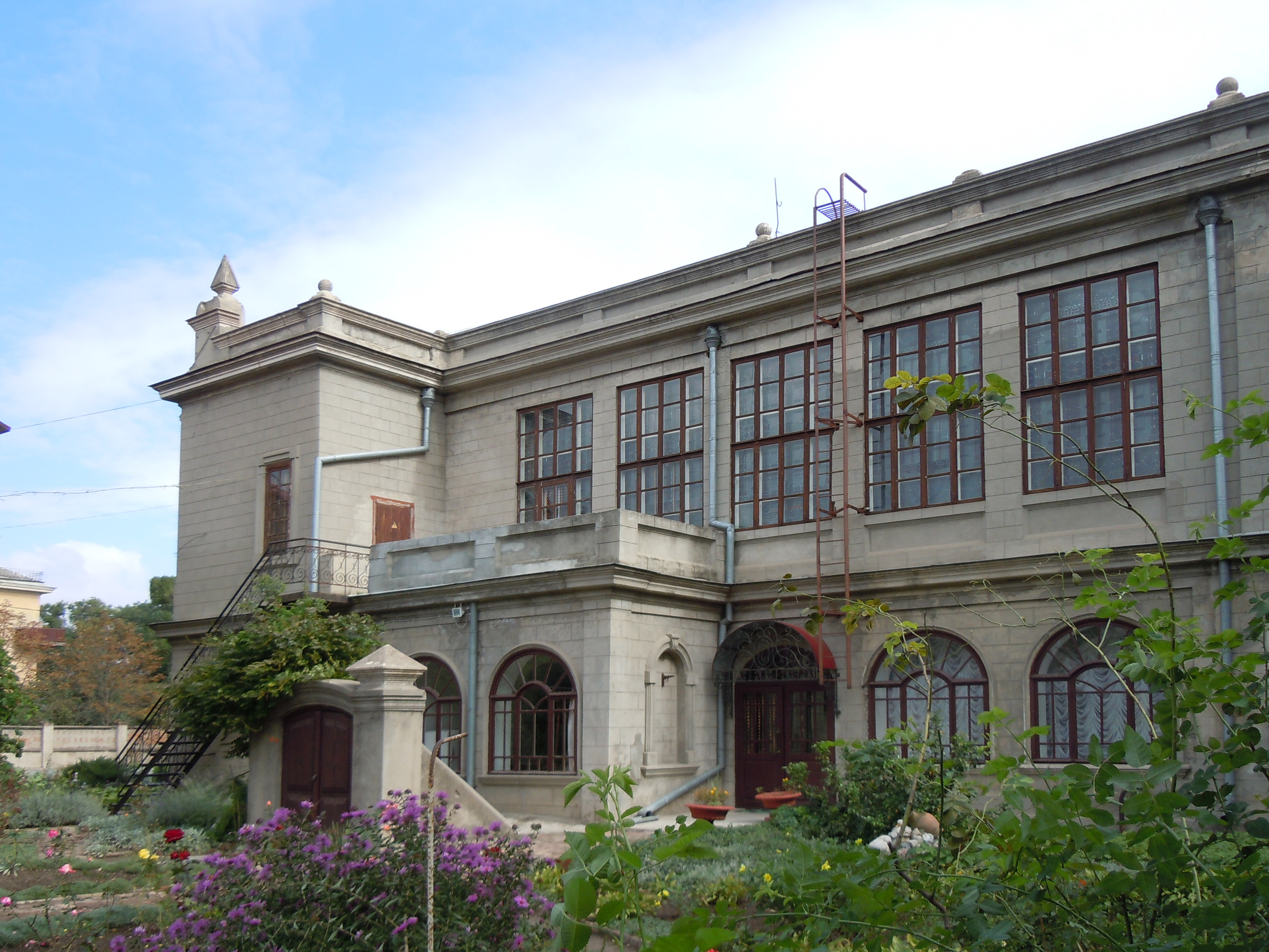 Особняк Тульчіанова (з дворовим флігелем), Ізмаїл, Котовського вул., 51 ріг Суворова просп.